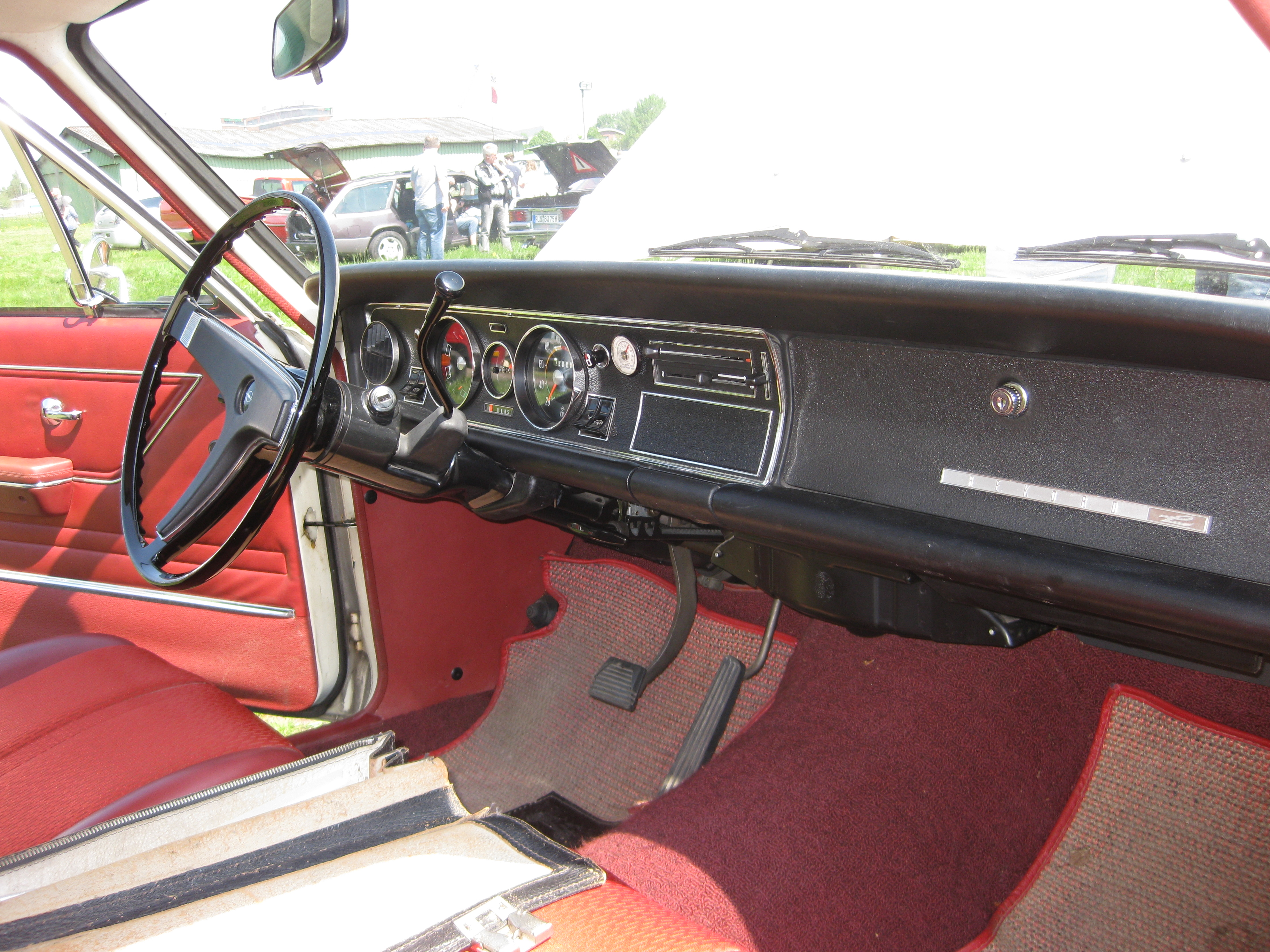 Opel Rekord C 1700 Cockpit